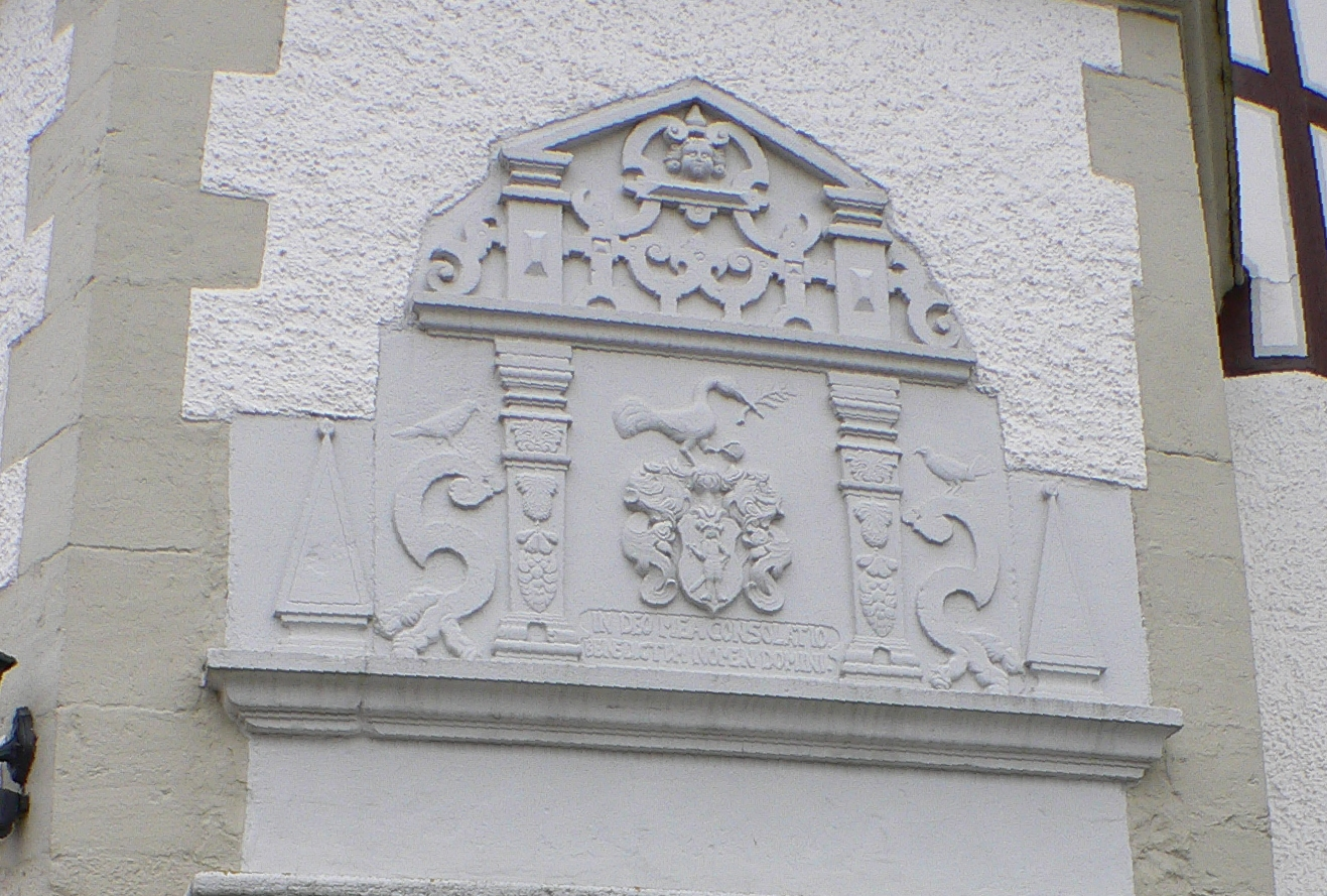 Wasserburg Lispenhausen (Wappenstein) in Rotenburg a.d. Fulda-Lispenhausen, Hessen, Regierungsbezirk Kassel, Landkreis Hersfeld-Rotenburg